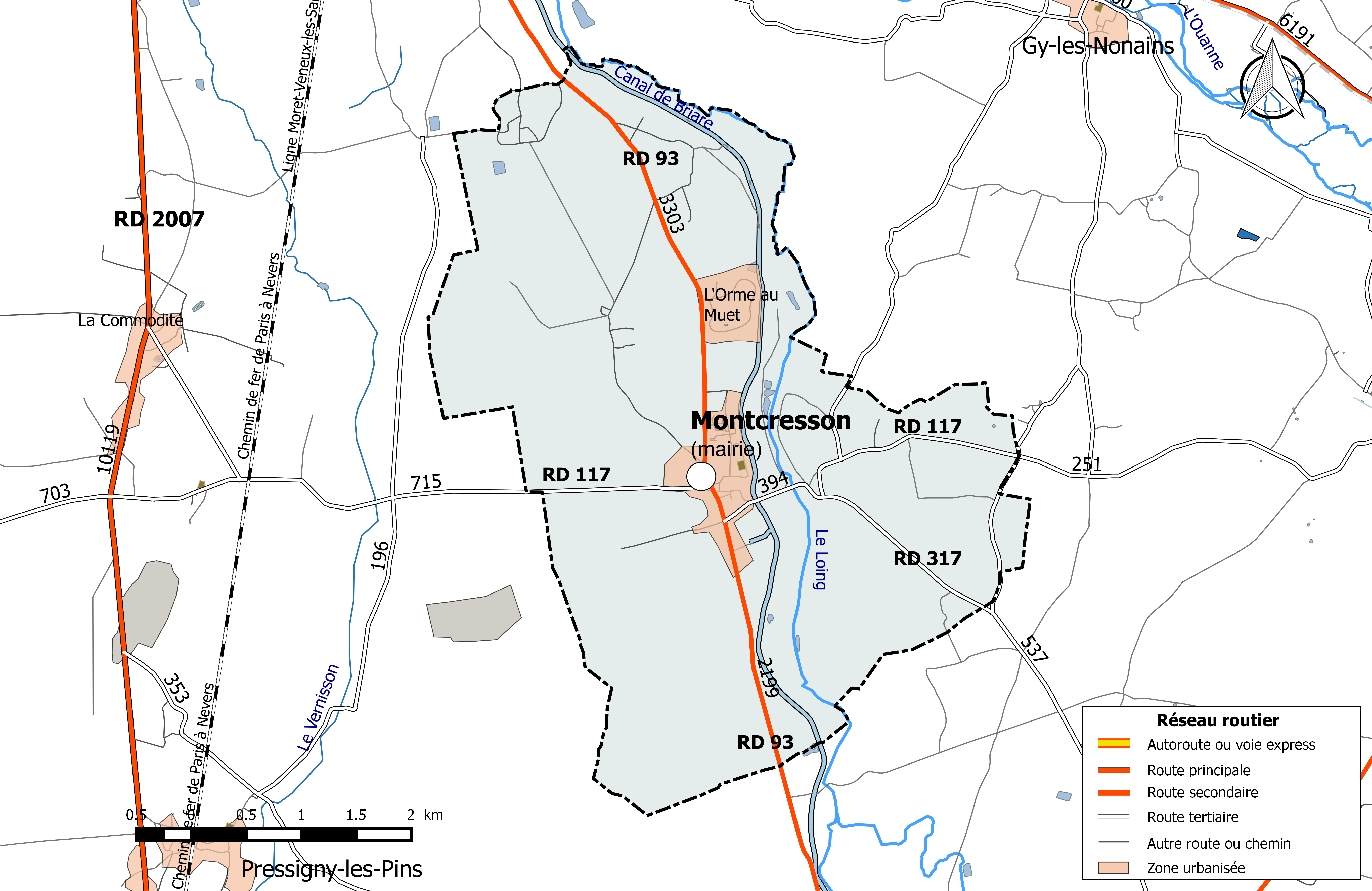 Carte du réseau routier de la commune de Montcresson.